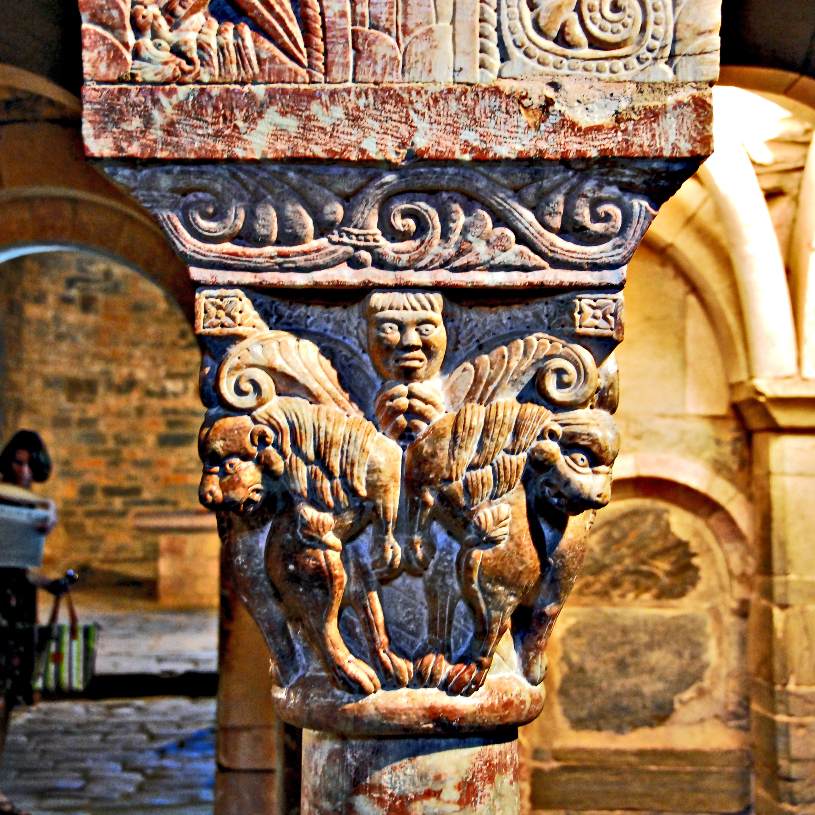 Serrabone, Empore, kapitell Nr 8